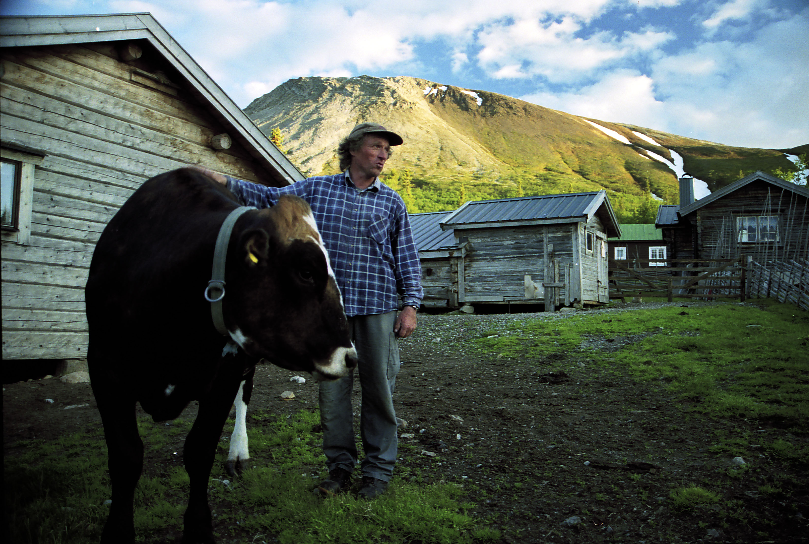 Nyvallens fäbodvall i Härjedalen med Alf-Erik Kristofferson och en fjällko.